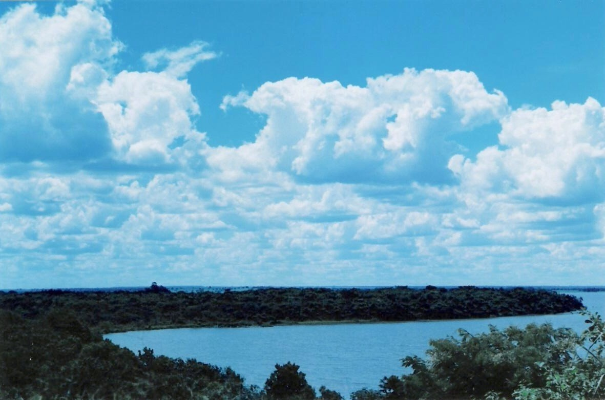 Descrição: Mata Atlântica na Cascalheira, em Três Lagoas, Mato Grosso do Sul, Brasil. 2007.